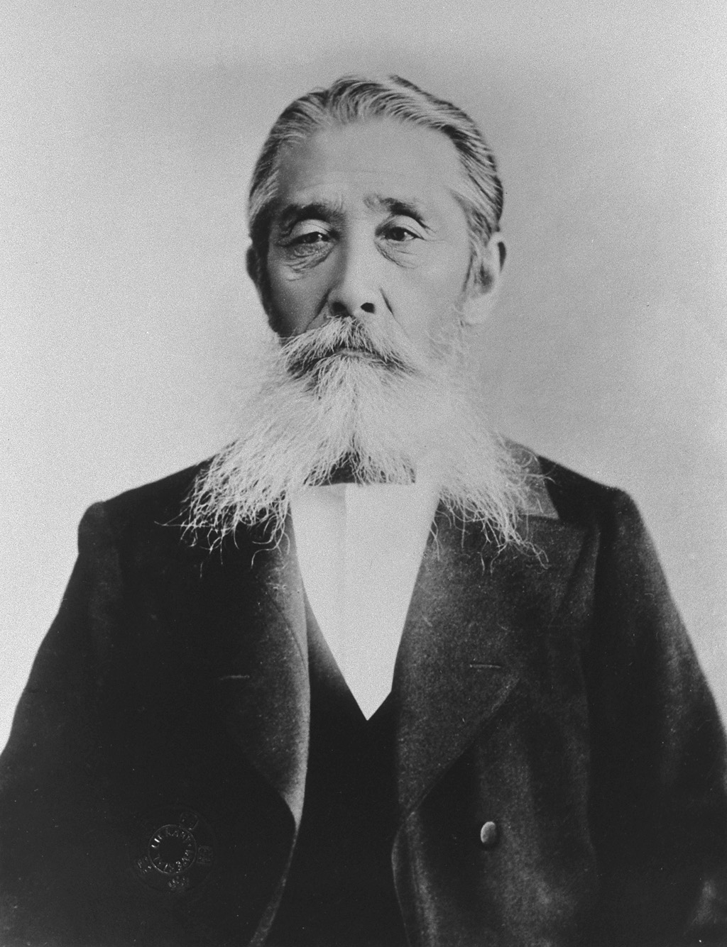 Portrait of Itagaki Taisuke (板垣退助, 1837 – 1919)